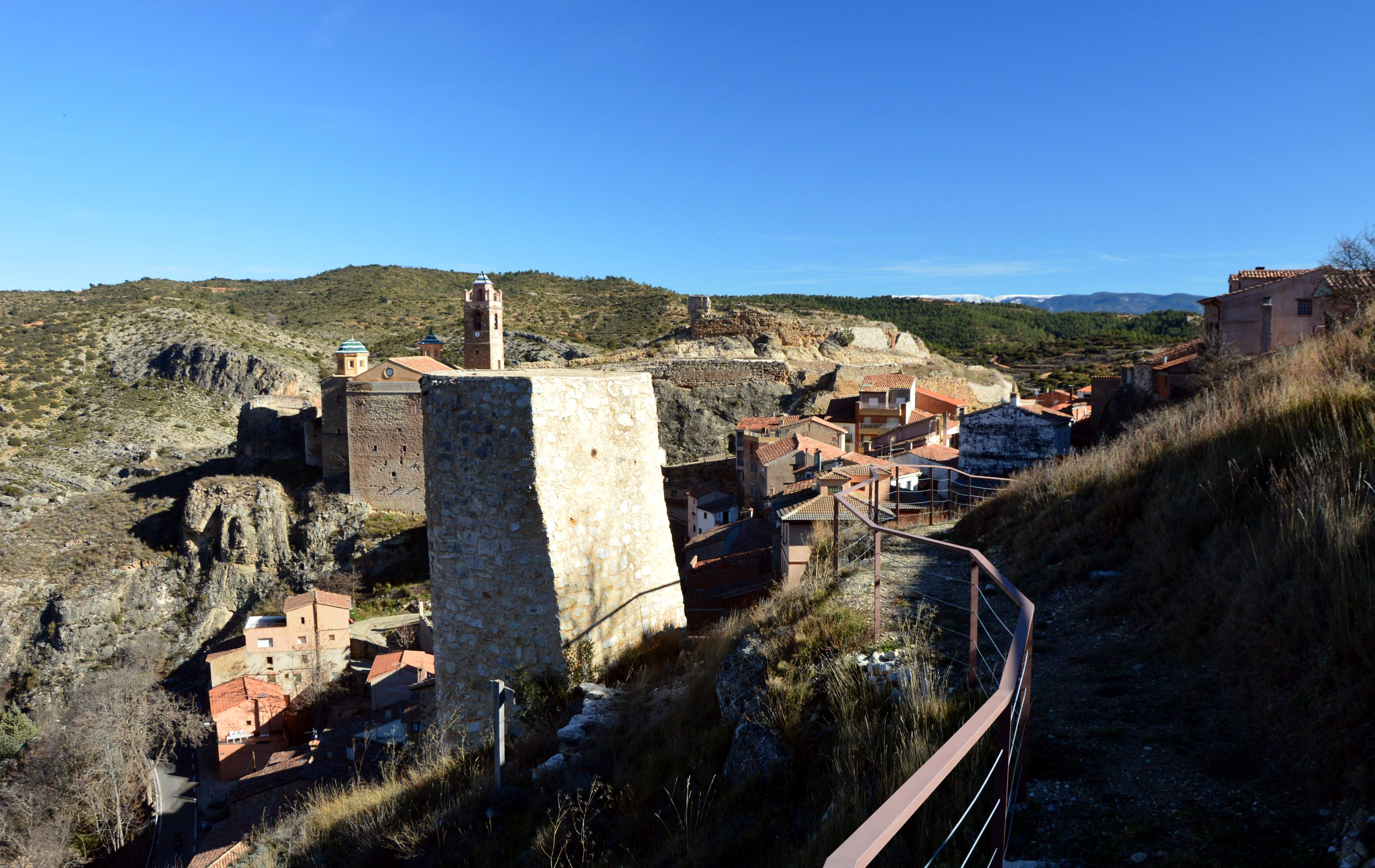 Vista parcial (noroccidental) de Castielfabib (Valencia), desde la calle Moral, con detalle de la Torre del Hospital (2019).